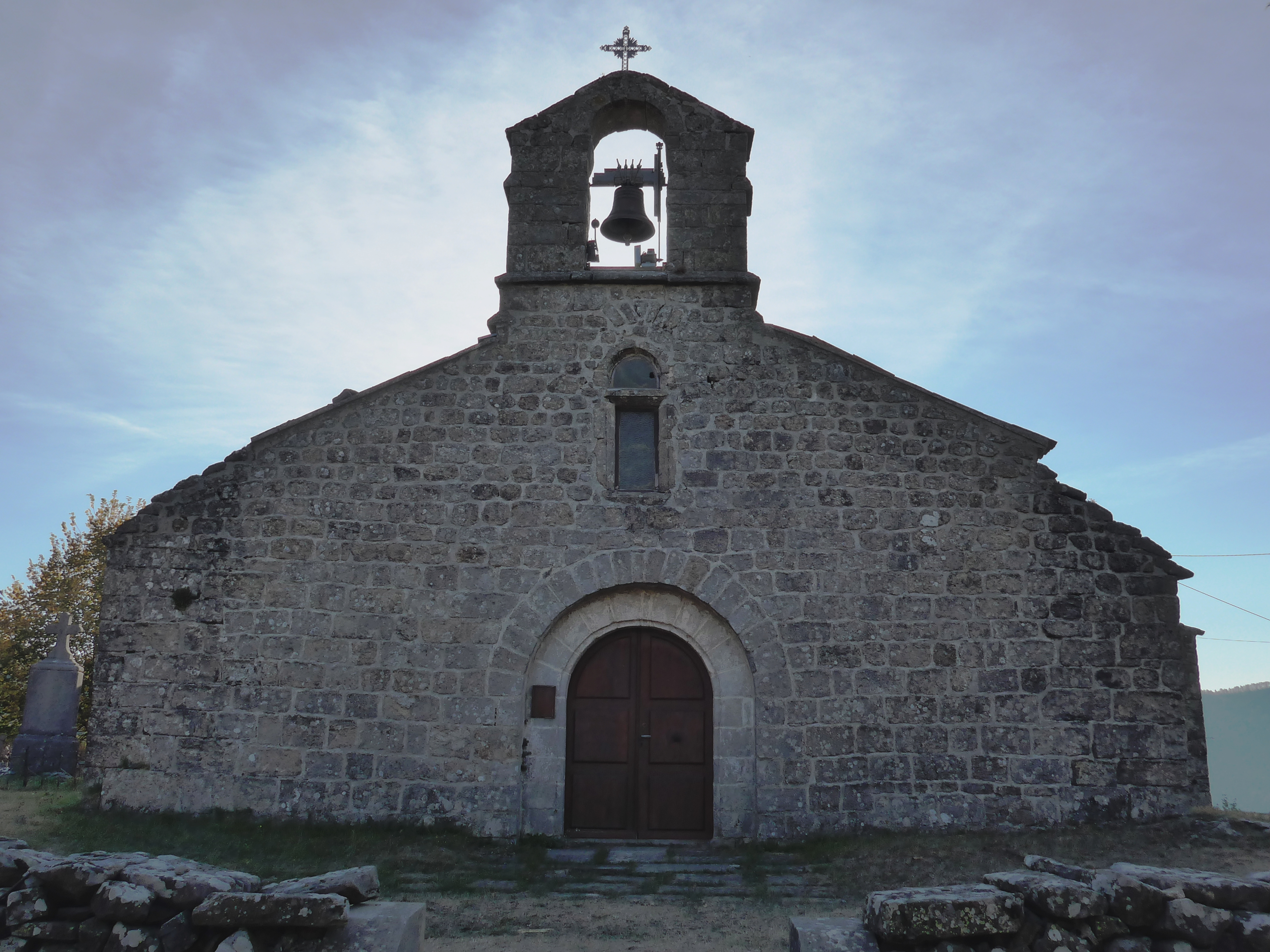 Église Saint-Julien de Pourchères. Du 12° siècle, rénovée au 17° et 18°. Une charmante petite église où subsiste le sens de l'hospitalité et de la fête.